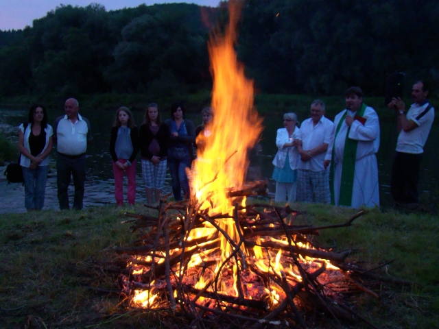 Noc świętojańska nad Sanem